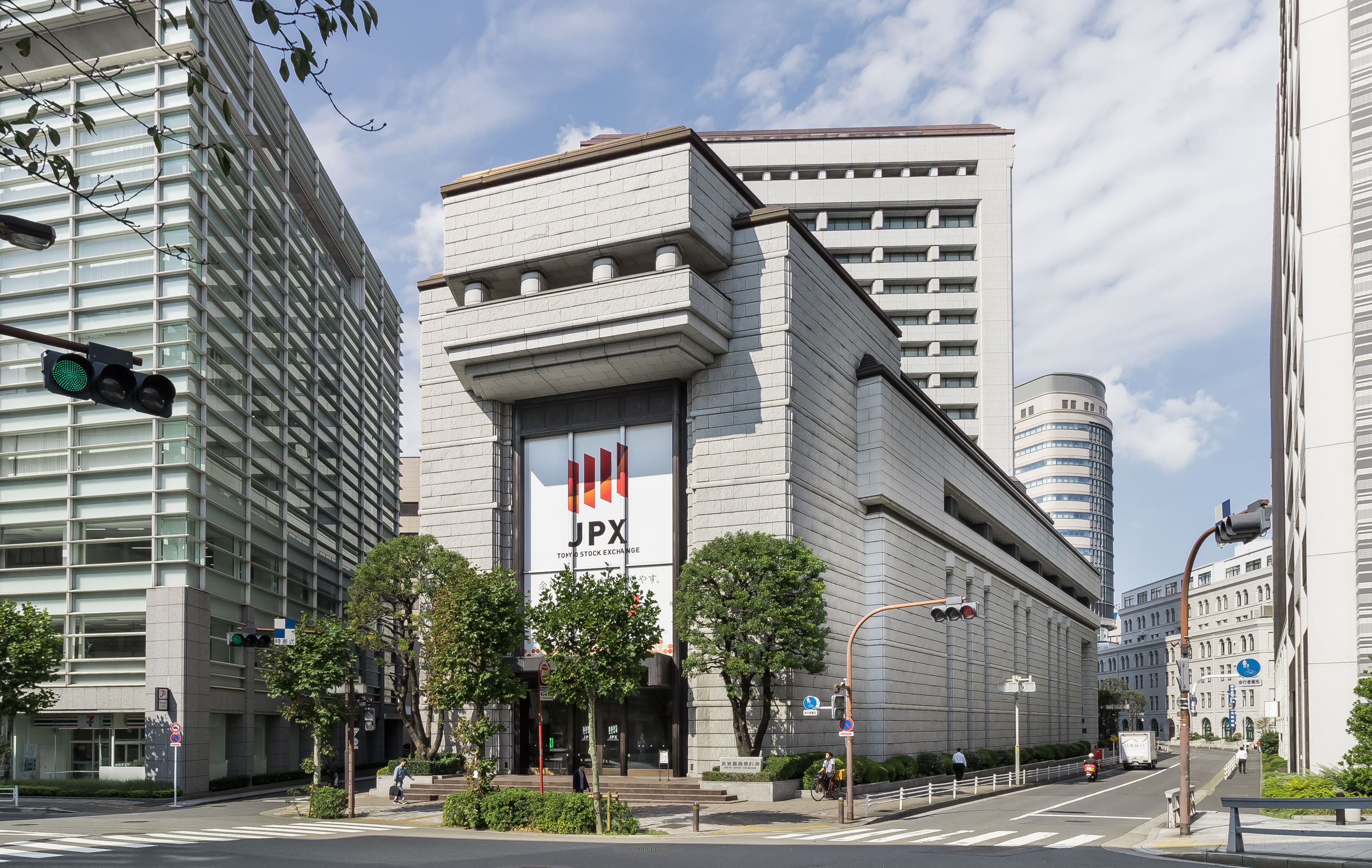 東京証券取引所（東京都中央区）。